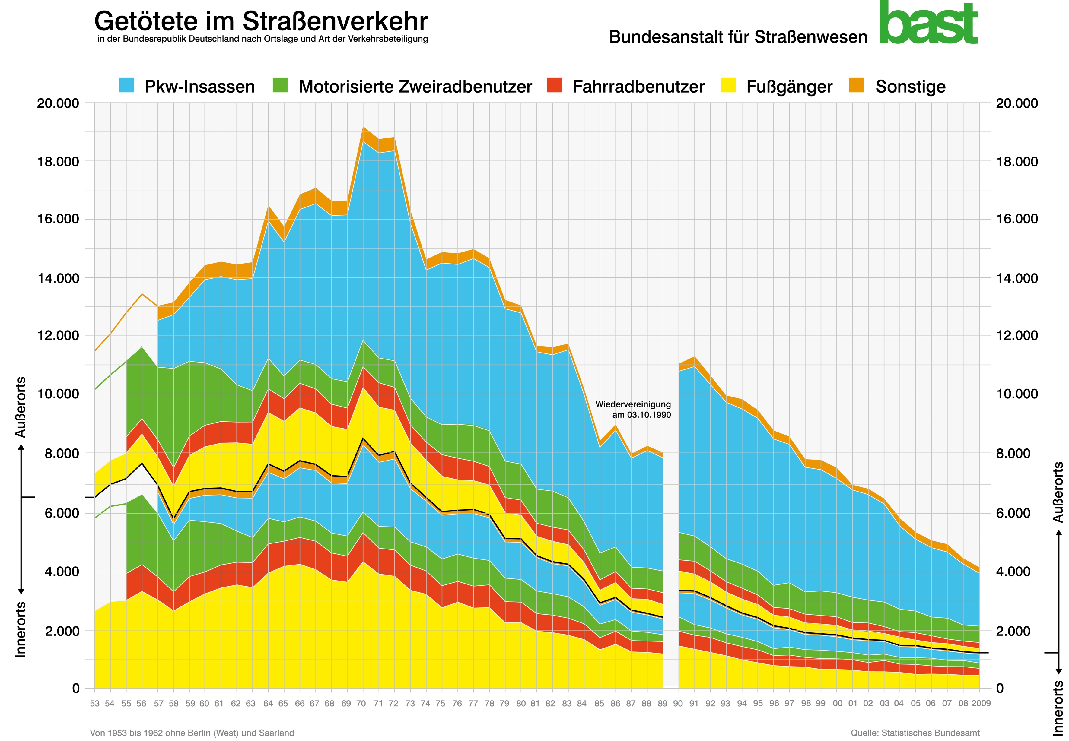 Diagramm: Getötete im Straßenverkehr 2009